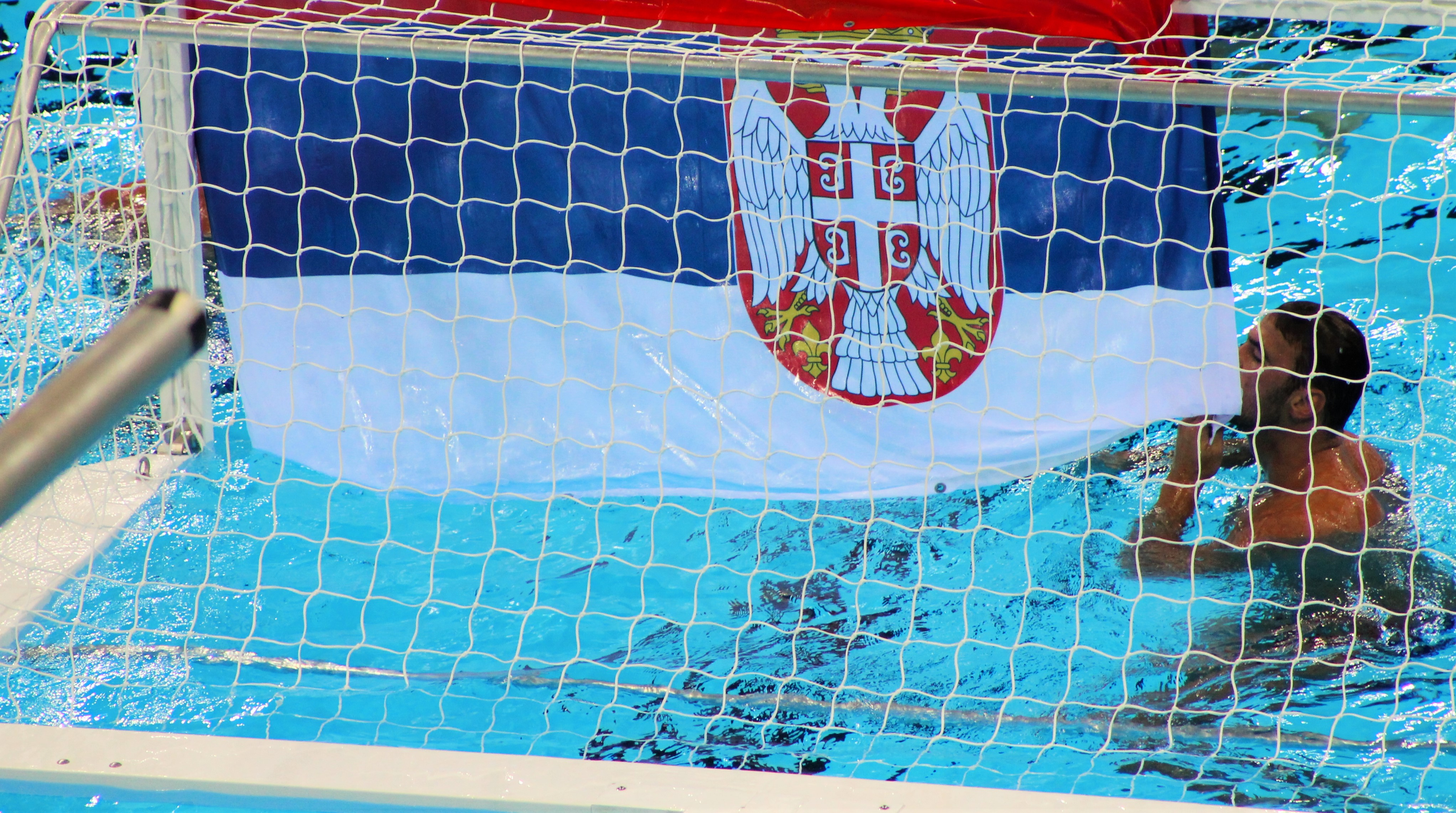 Jogador Sérvio beija bandeira após conquista do ouro